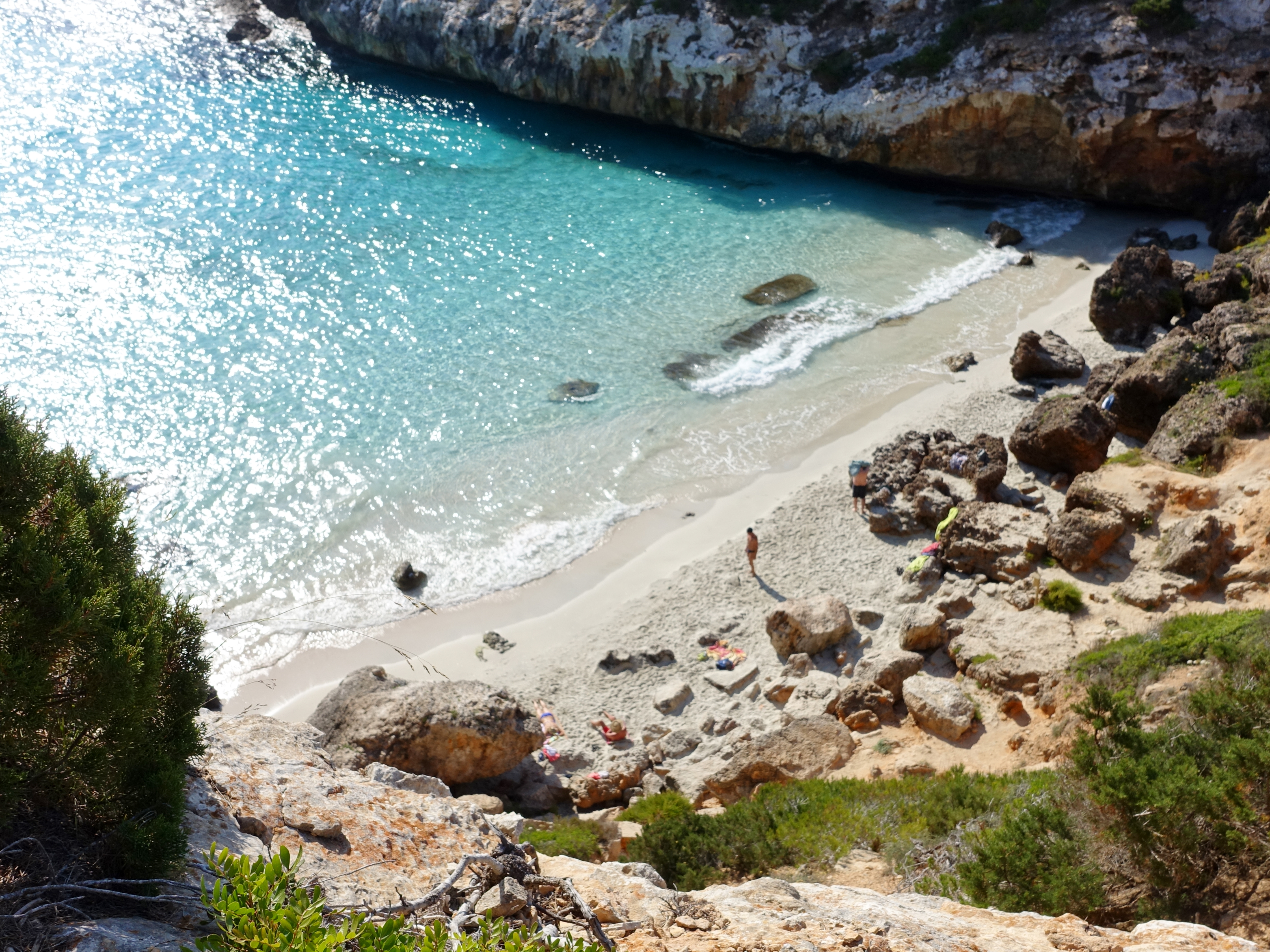 Caló des Moro, Gemeinde Santanyí, Mallorca, Spanien